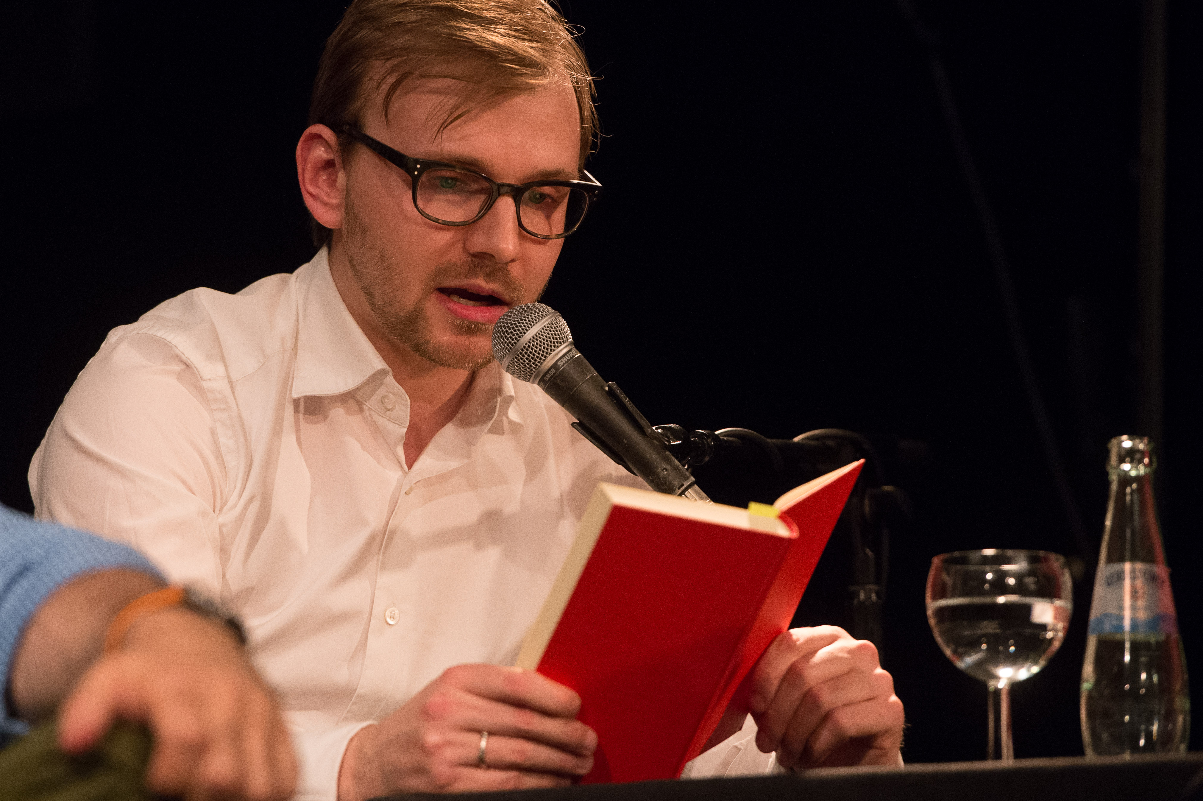 Martin Kiefer (Schauspieler, Volksbühne Berlin), Foto